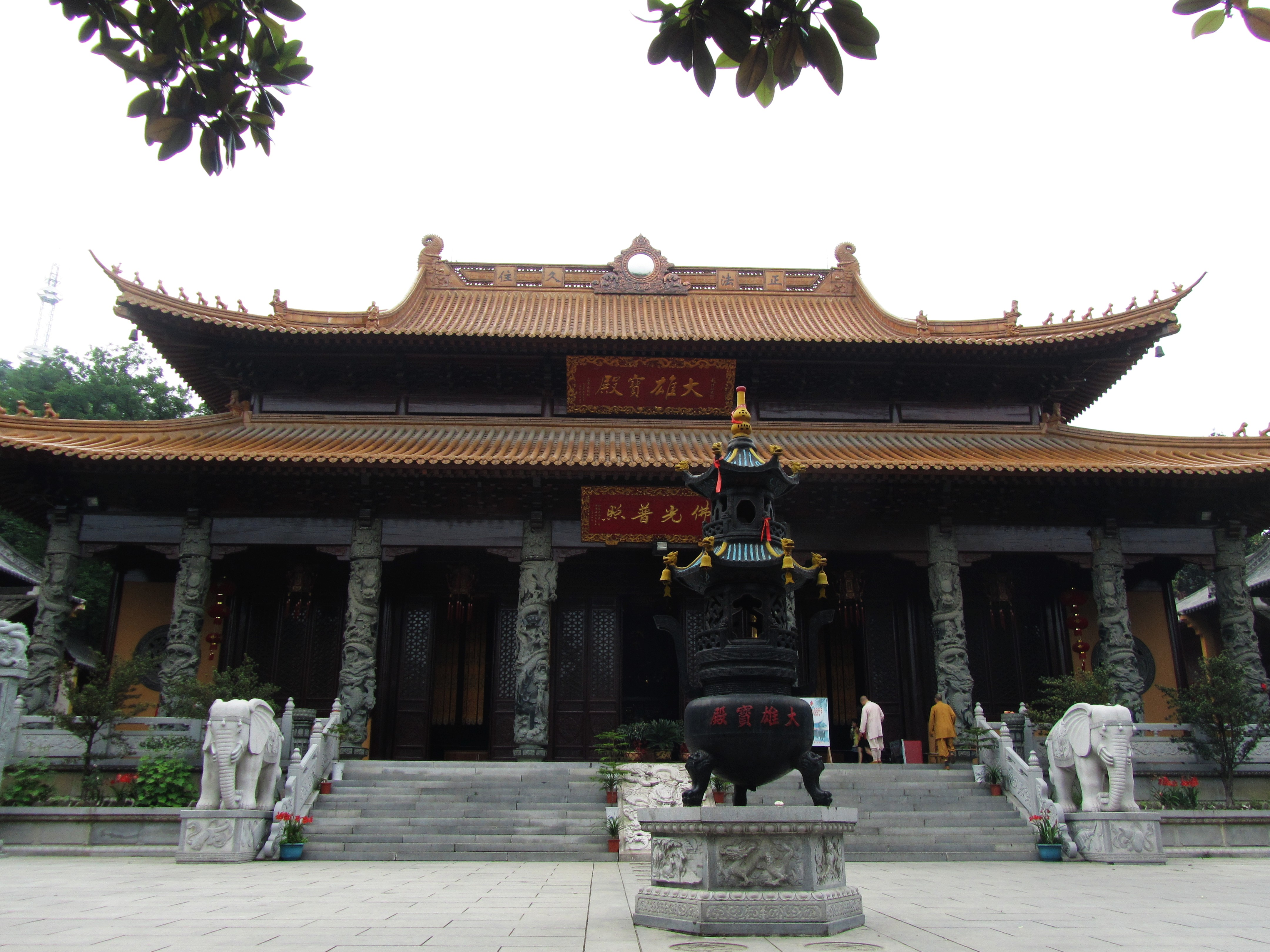 芜湖广济寺，大雄宝殿。